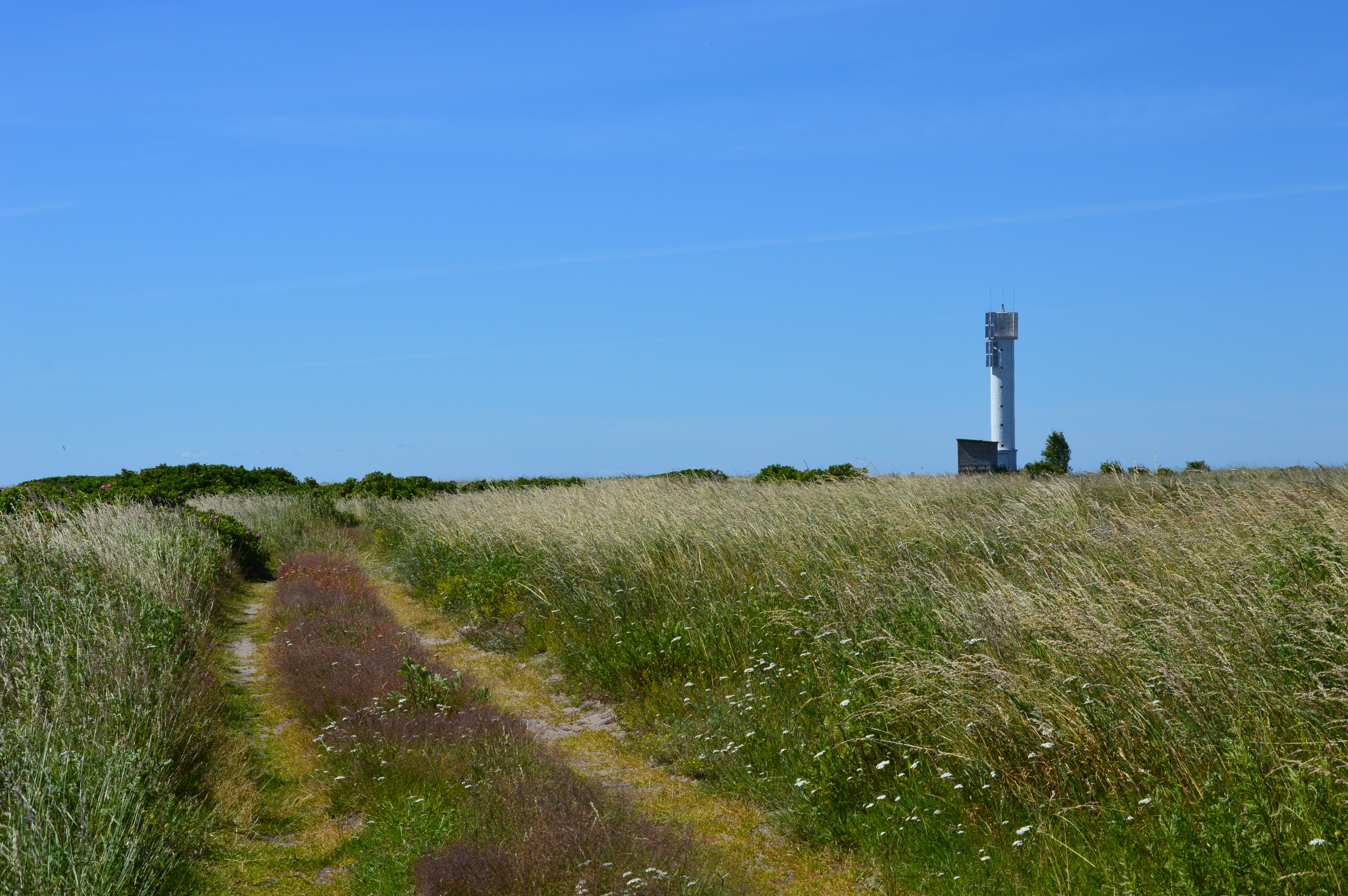 Prangli loode tulepaak.